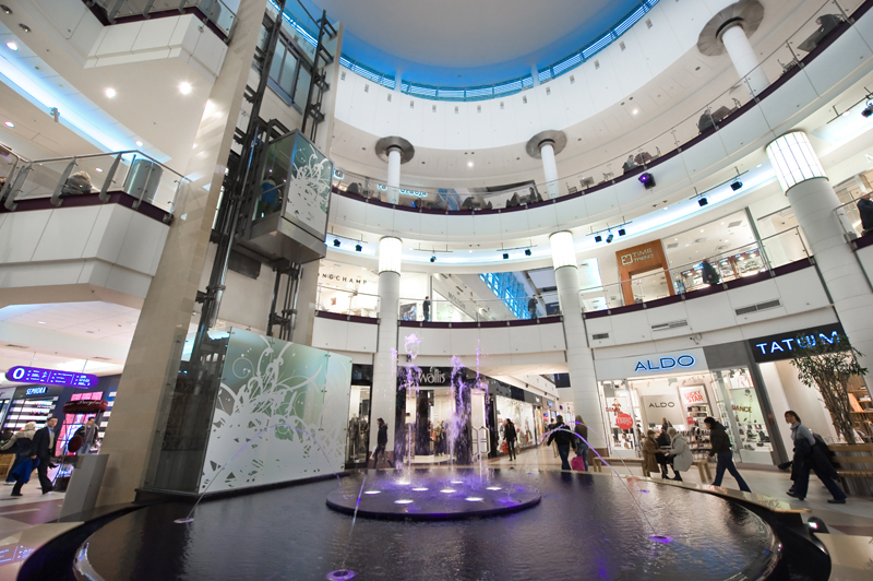 Wnętrze centrum handlowo-rozrywkowego Galeria Mokotów